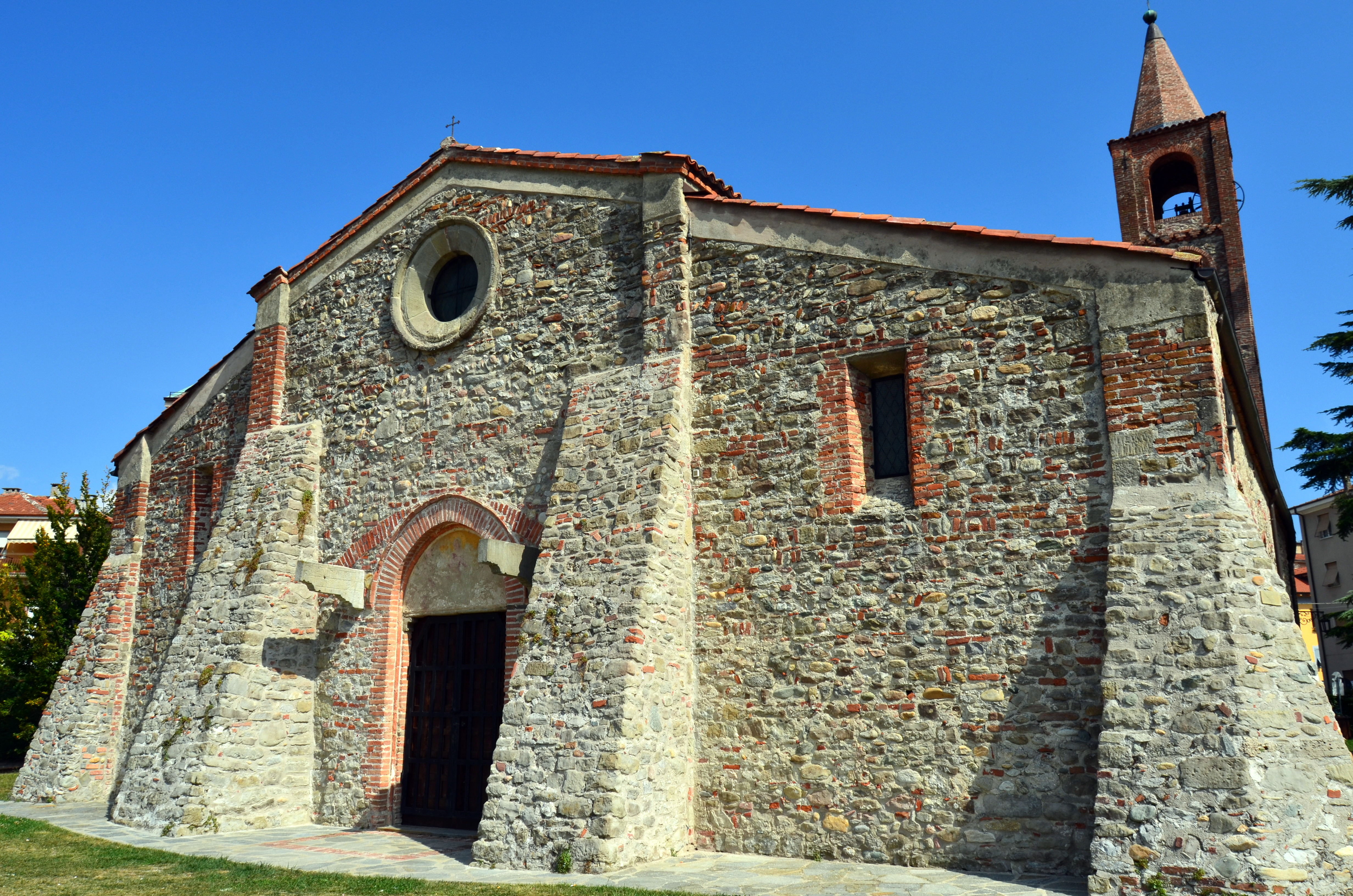 Chiesa di Santa Maria Extra muros, Millesimo, Liguria, Italia